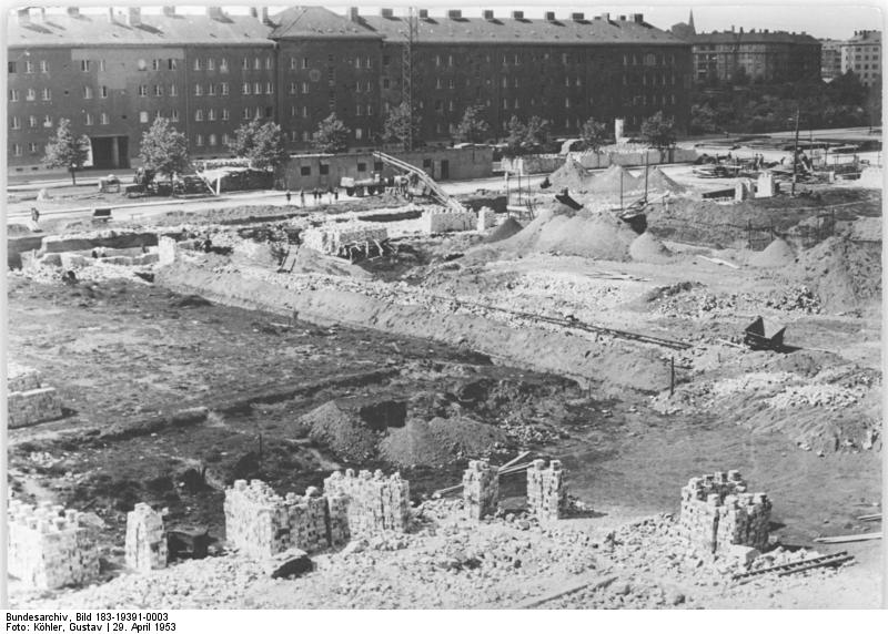 Zentralbild Köhler 29.4.1953 Großbaustelle Ostseestraße in Berlin-Nicht nur in der Stalinallee entstehen in Berlin neue und schöne Wohnhäuser für die Werktätigen, sondern auch an vielen anderen Stellen der Stadt. Eine dieser Großbaustellen ist die in der Ostseestraße im Bezirk Prenzlauer Berg. UBz: Blick auf einen Teil der Großbaustelle.